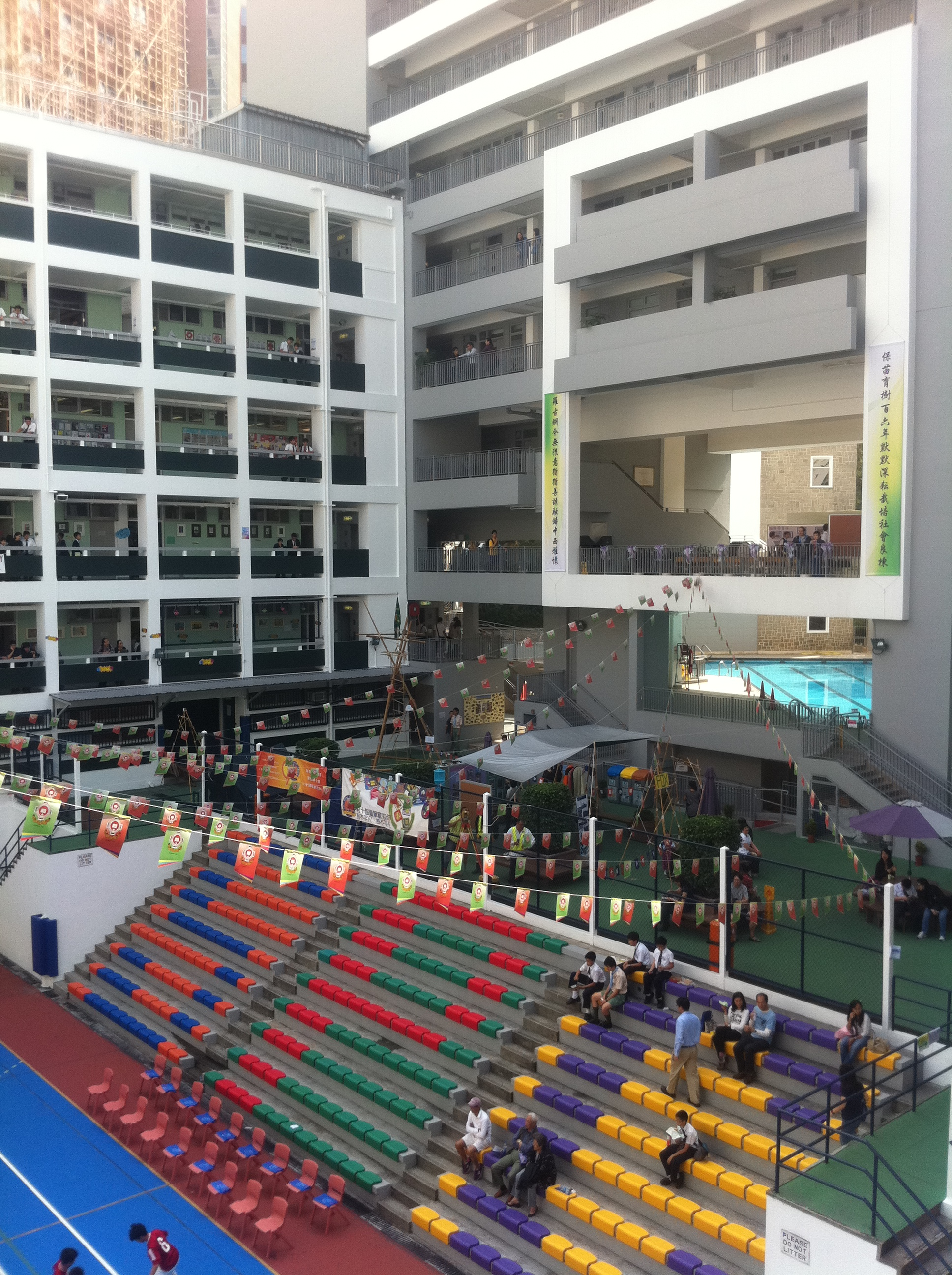 中文（香港）: 香港聖保羅書院 2011年11月 開放日